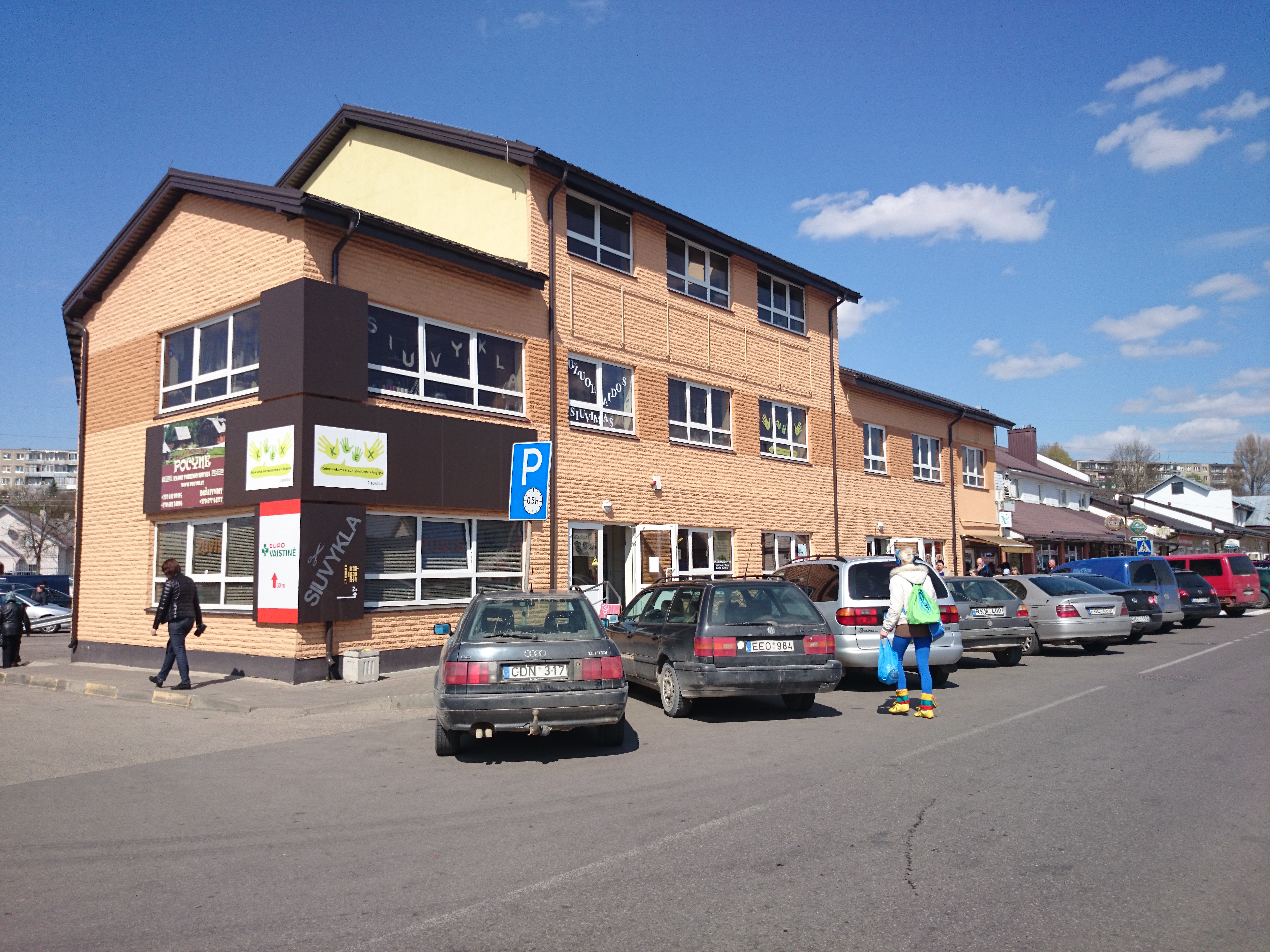 Jonava